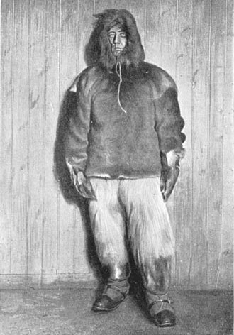 Aan de Zuidpool